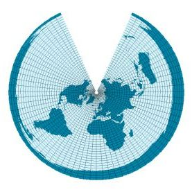 Kegelprojektion längentreu